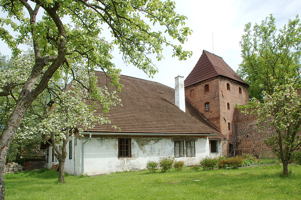 Středověké opevnění - věž Kaplanka a staré děkanství